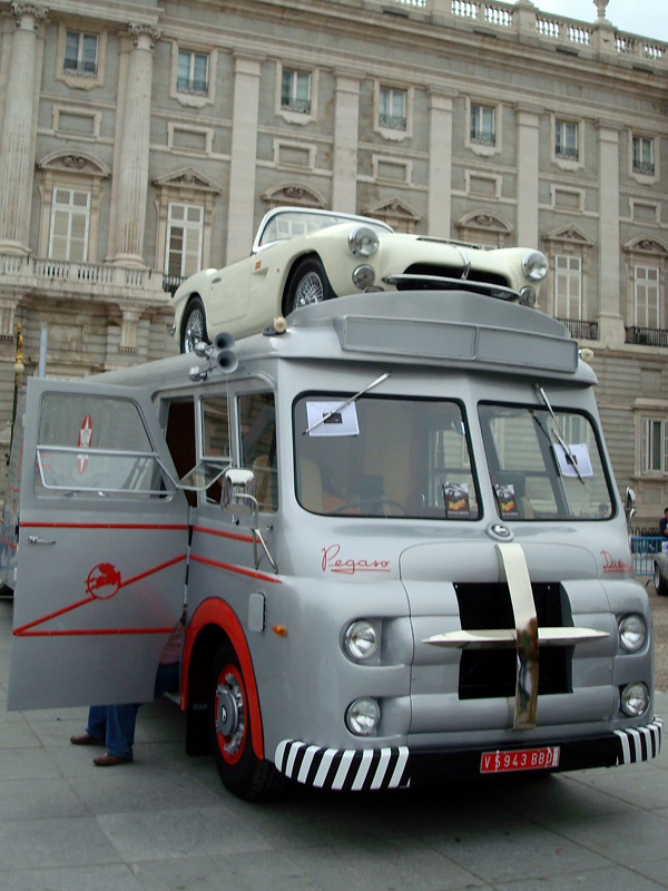 Autobús sobre chasis Pegaso Z-401 con carrocería portacoches.